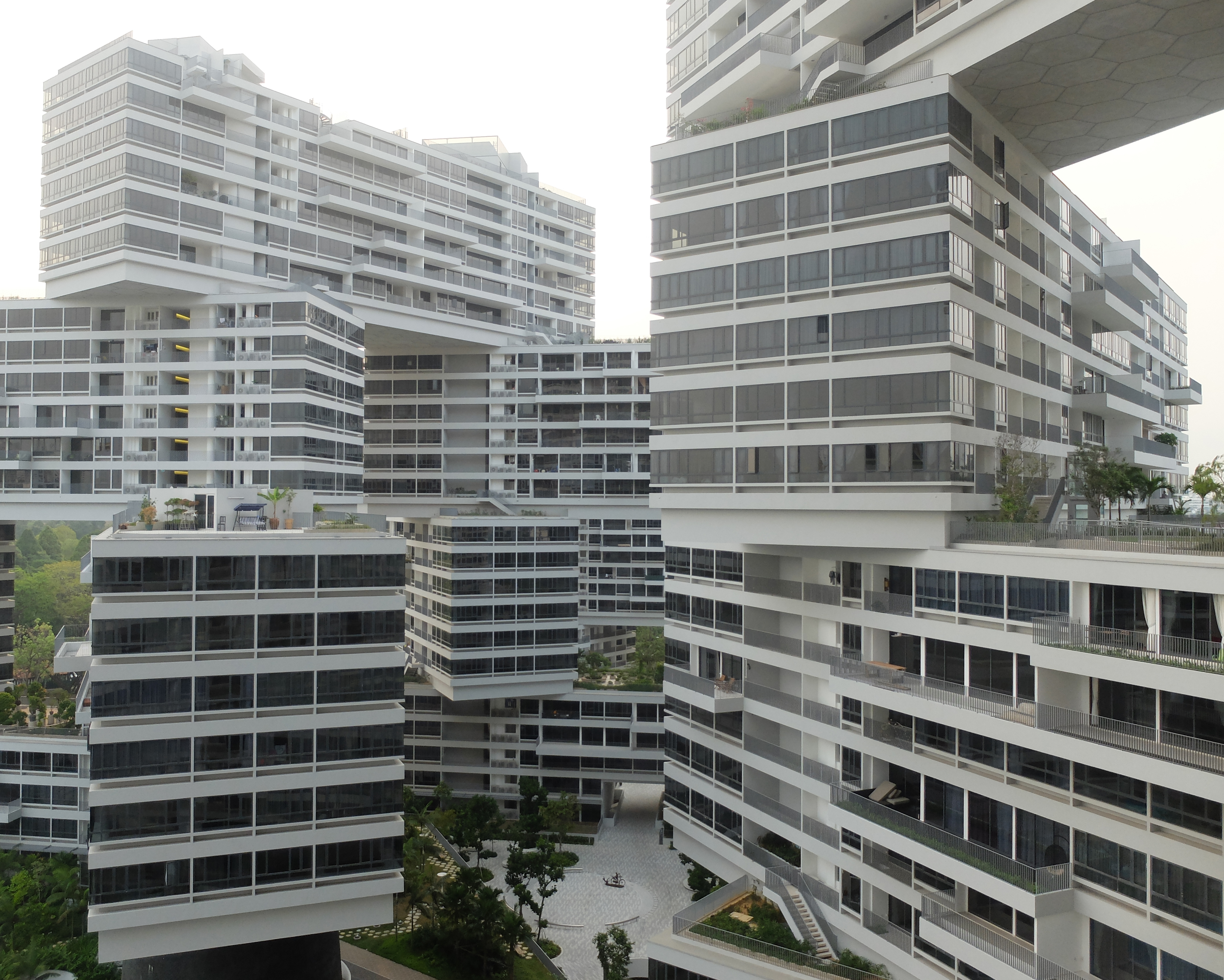 Singapore / 2014